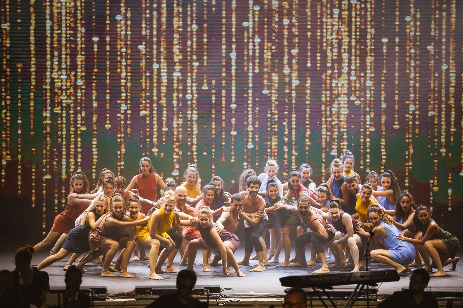 תמונת מחול